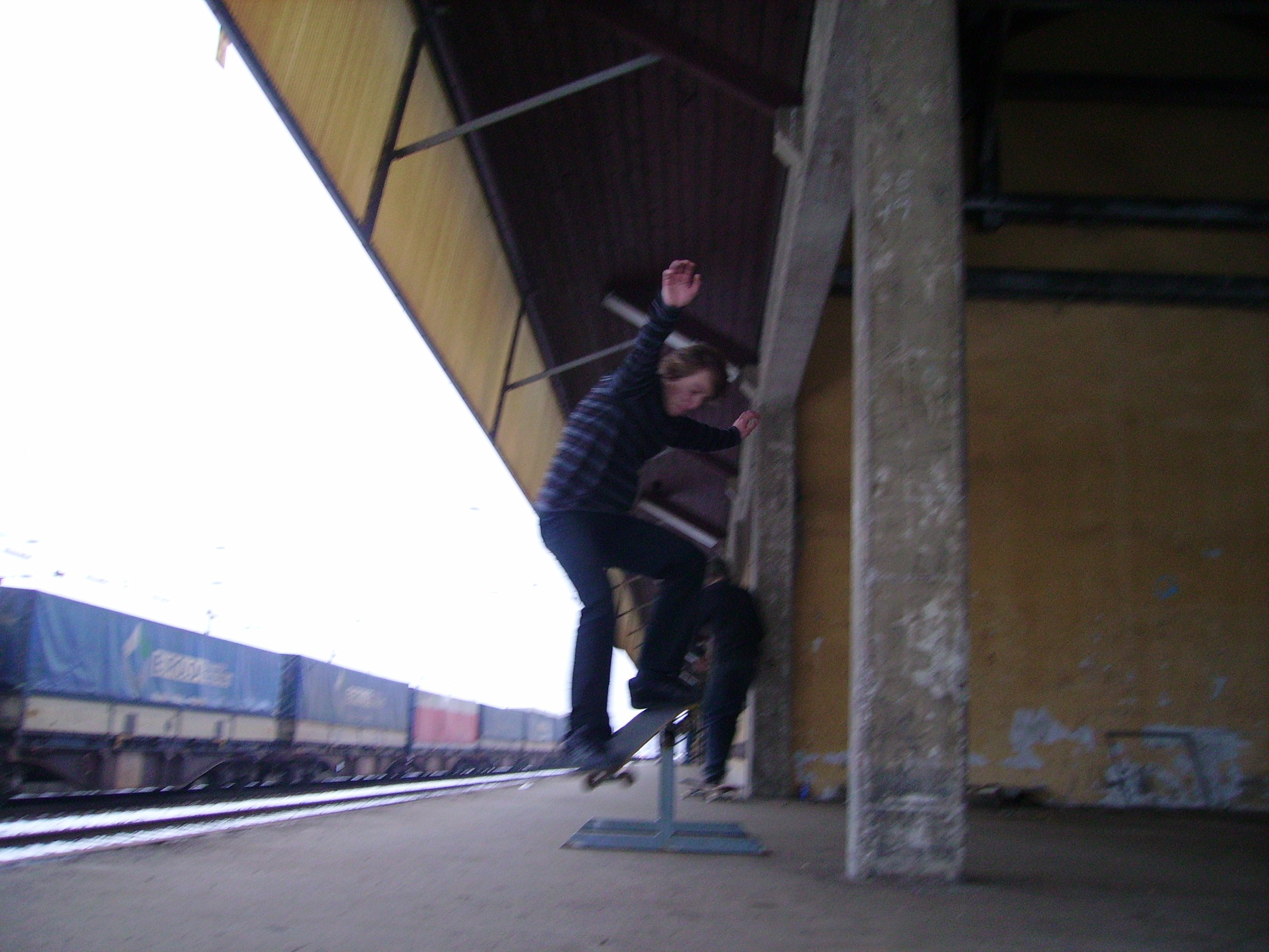 Frontside Smithgrind (Skateboard Trick) auf einem sogenannten "Flat-Rail"